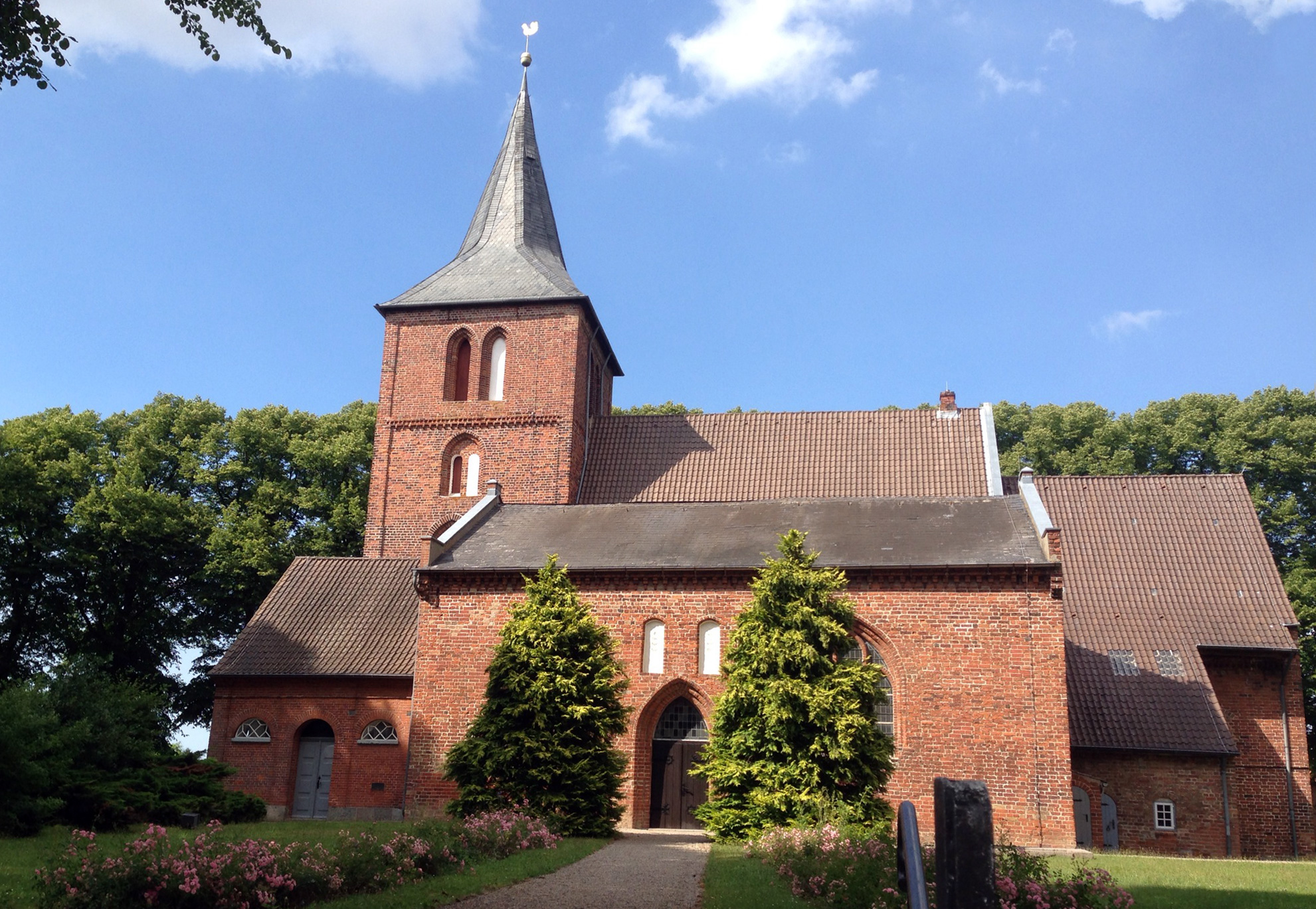 St.-Antonius-Kirche, Neukirchen (Ostholstein), Germany